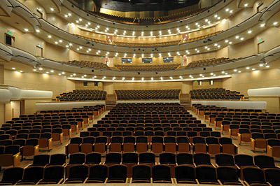 Sala Eduardo Fabini del Complejo Cultural Sodre en Montevideo, Uruguay